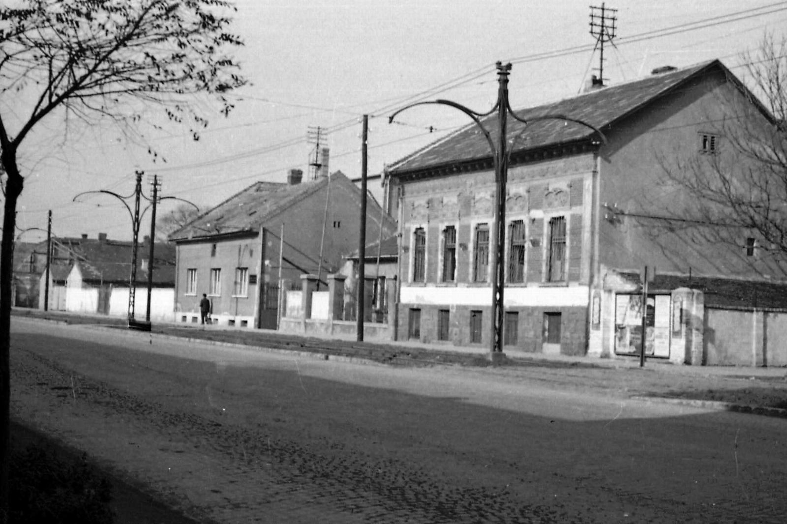 Fehér Ferenc Precíziós Mechanikai és Gépműhelye. Kispest, Üllői út